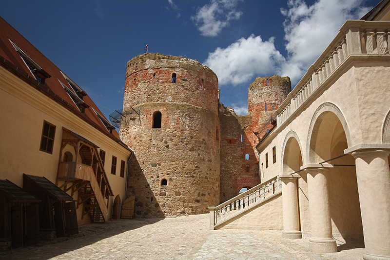 Bauskas viduslaiku pils, Bauska